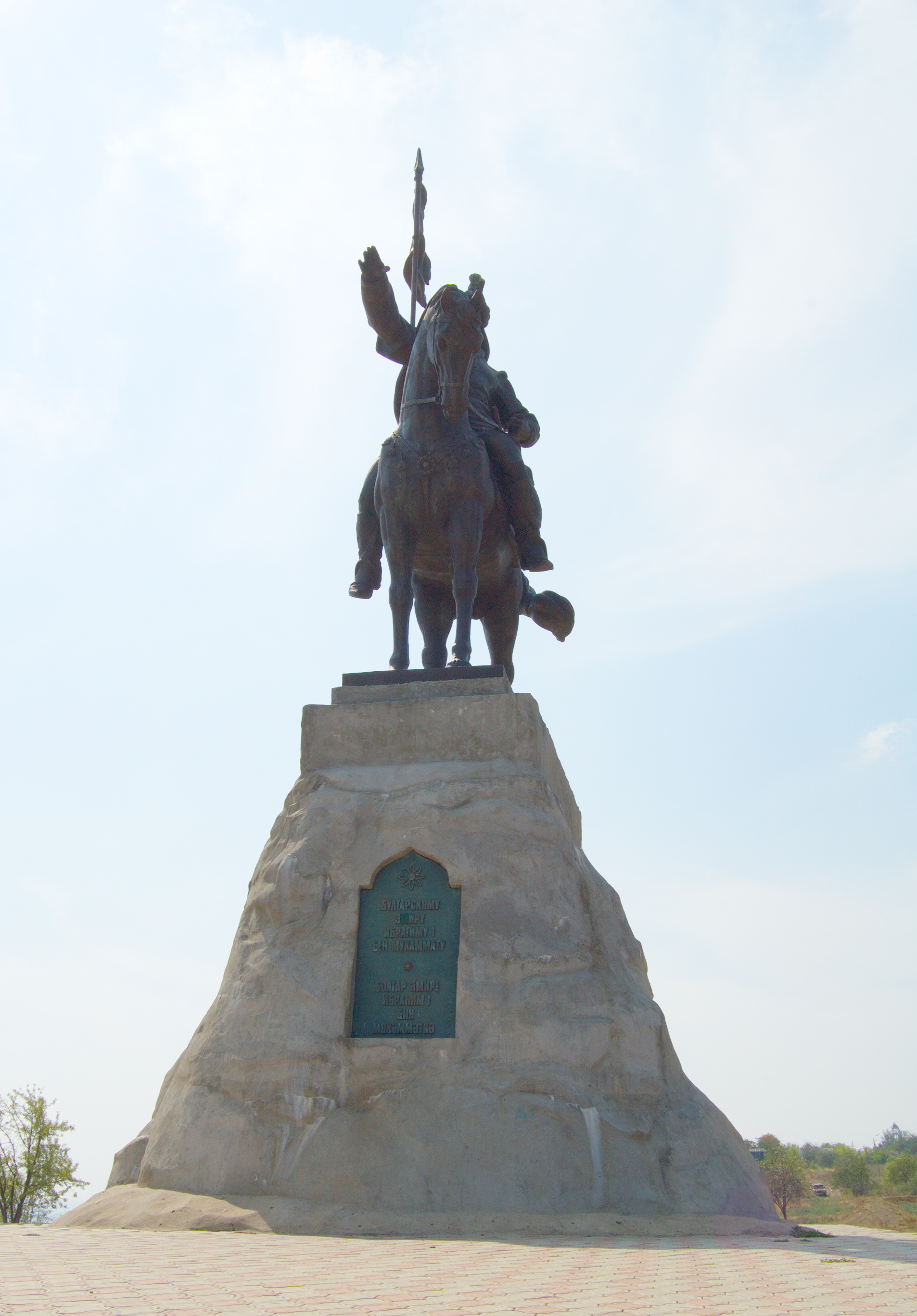 Елабужский государственный историко-архитектурный и художественный музей-заповедник (Республика Татарстан, Нижнекамск, город Елабуга)